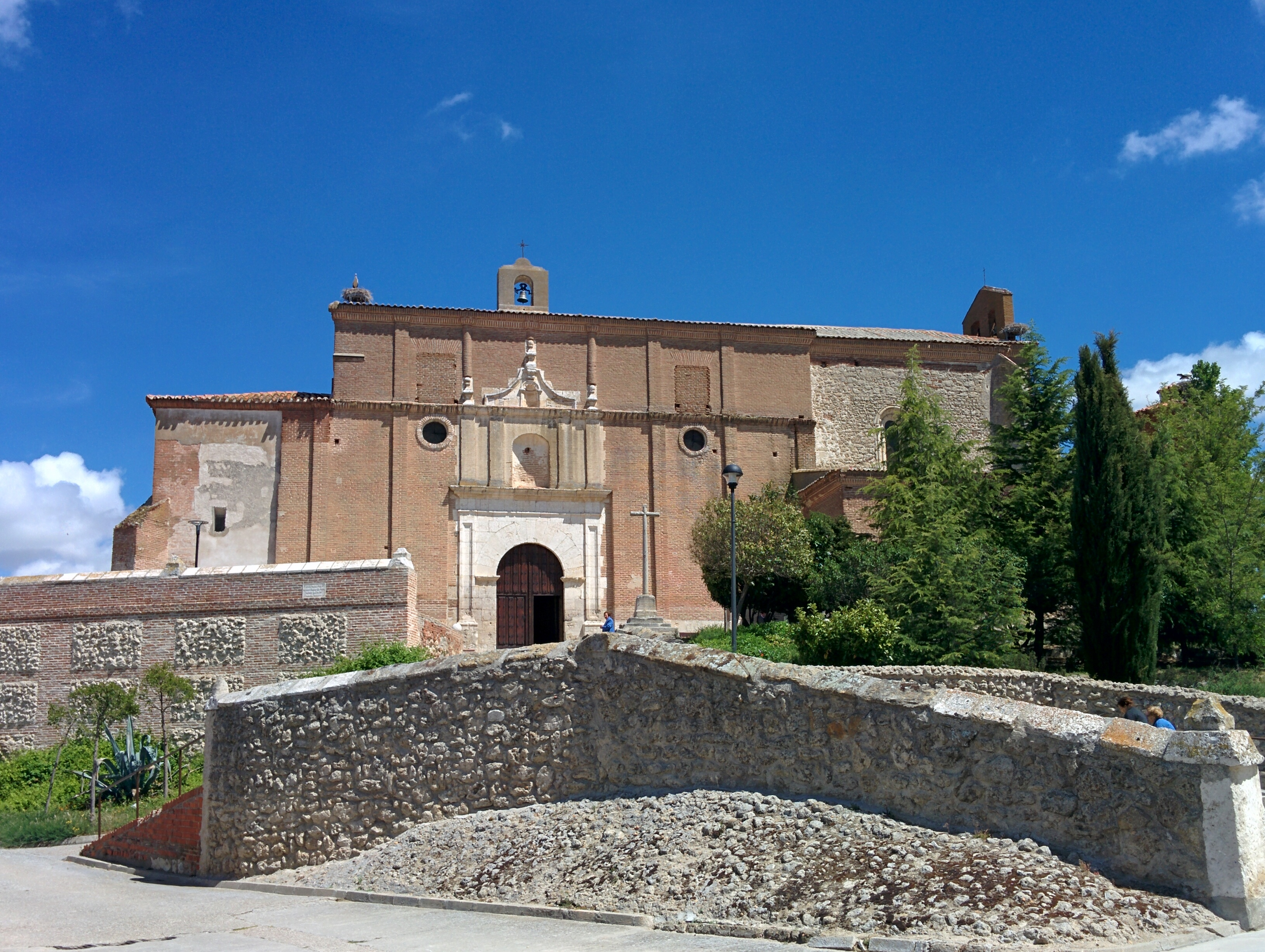 Iglesia de Santa María del Castillo, en Rubí de Bracamonte (Valladolid, España).